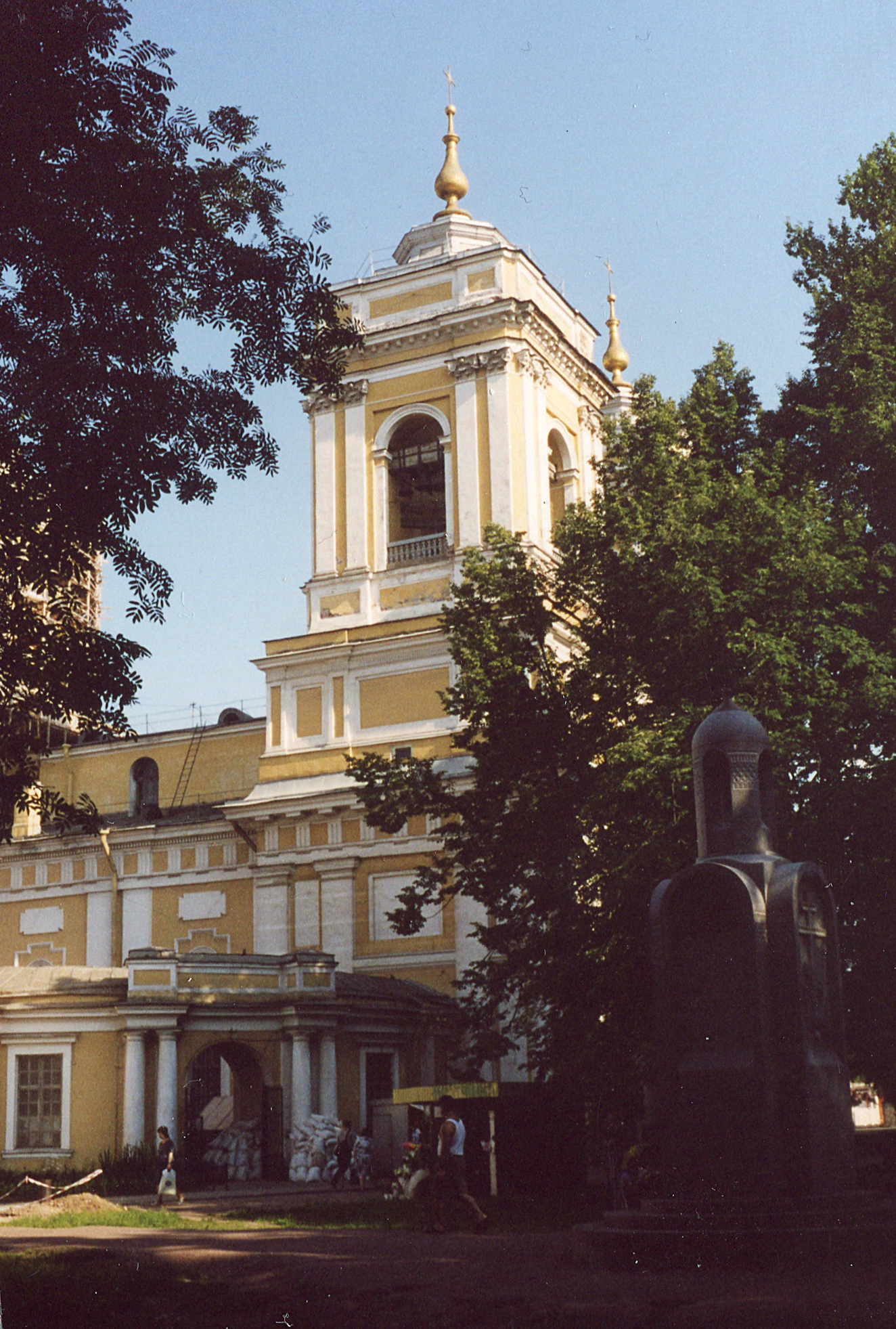 Троицкий собор Александро-Невской Лавры